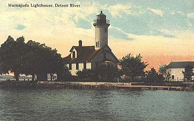 Ancien phare de l'île de Mamajuda, dans la rivière Détroit